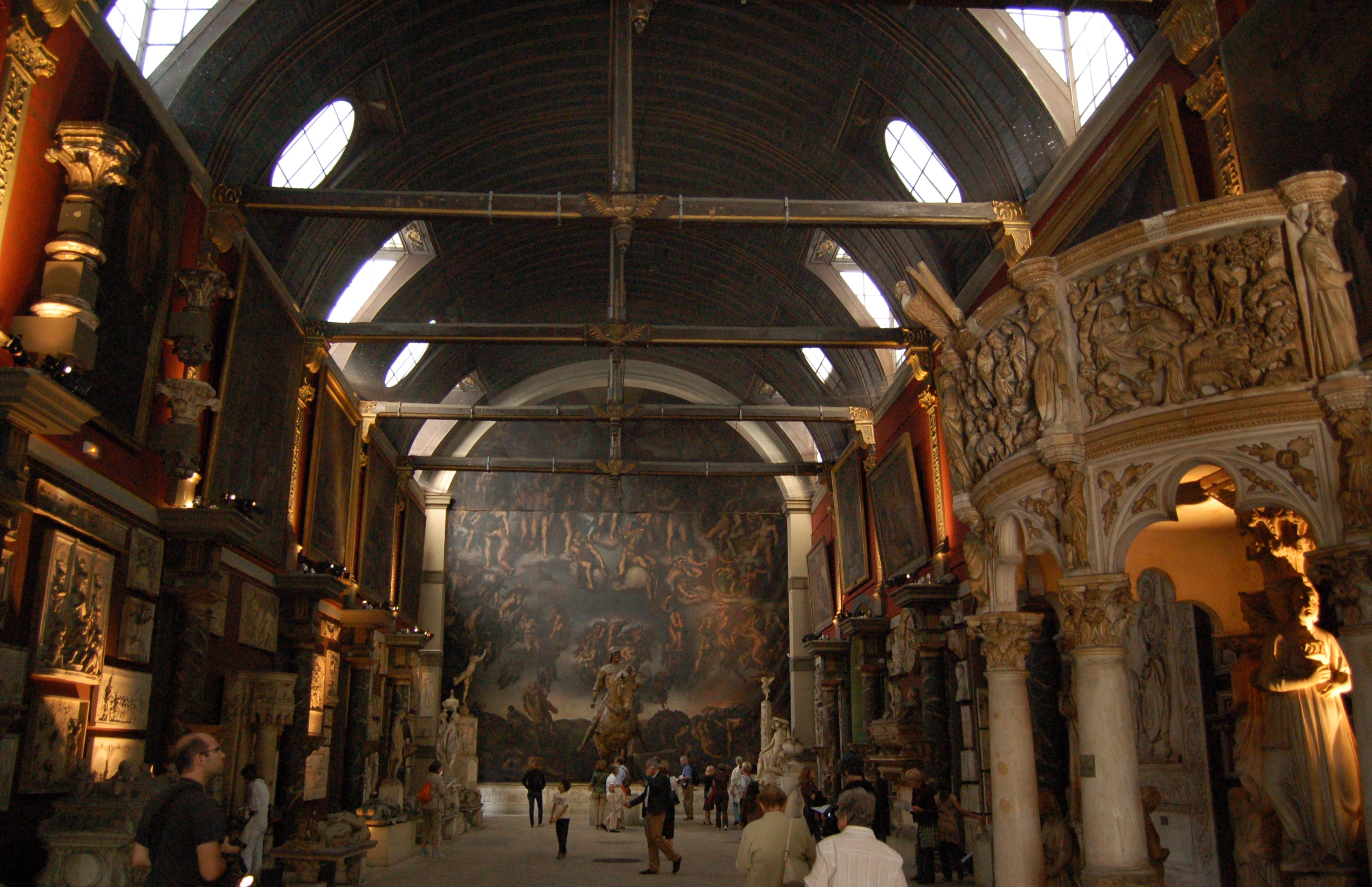 Chapelle de l'École Nationale Supérieure des Beaux-Arts, Paris, France.